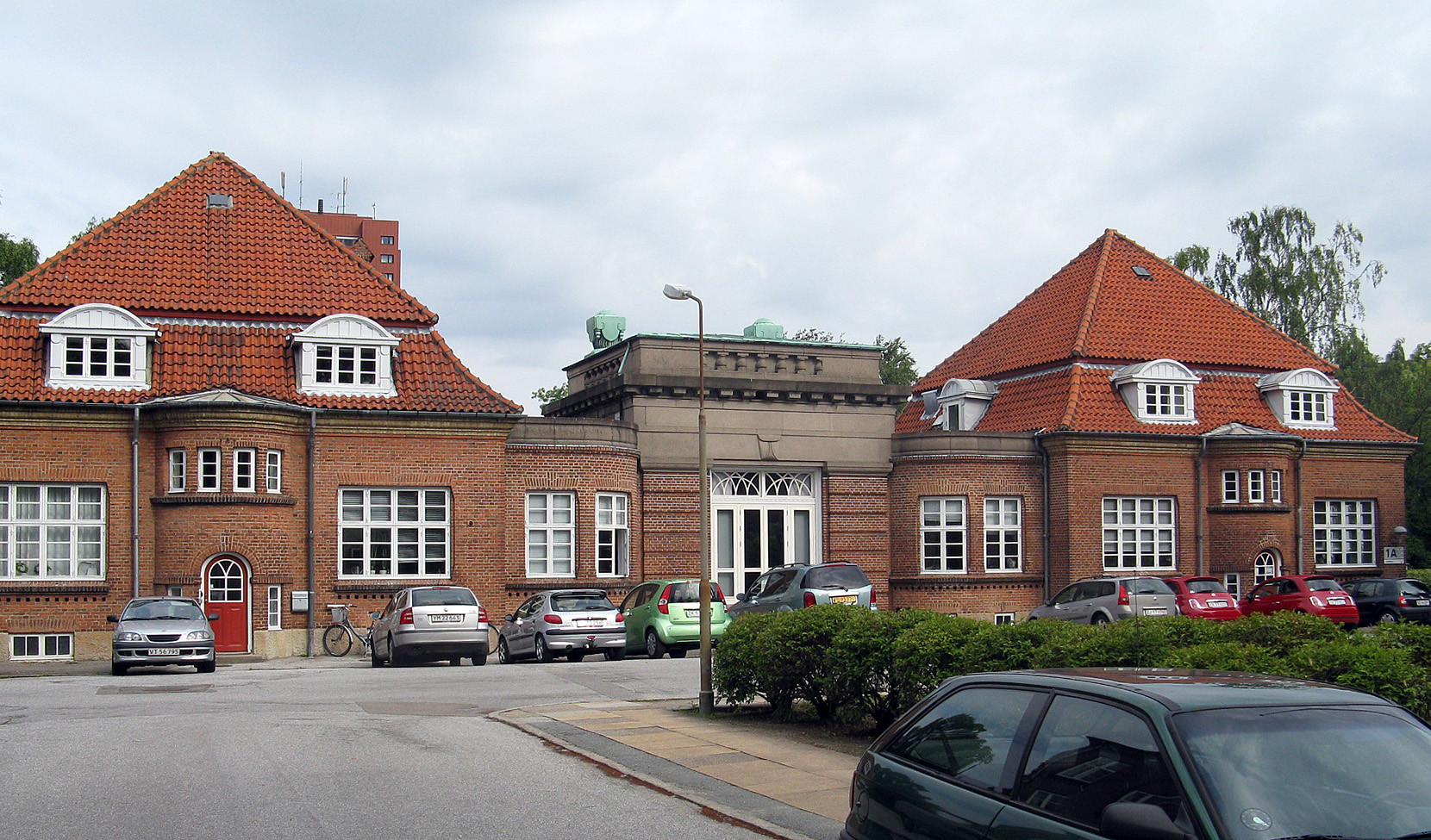 Marselisborg Hospital i Århus Danmark